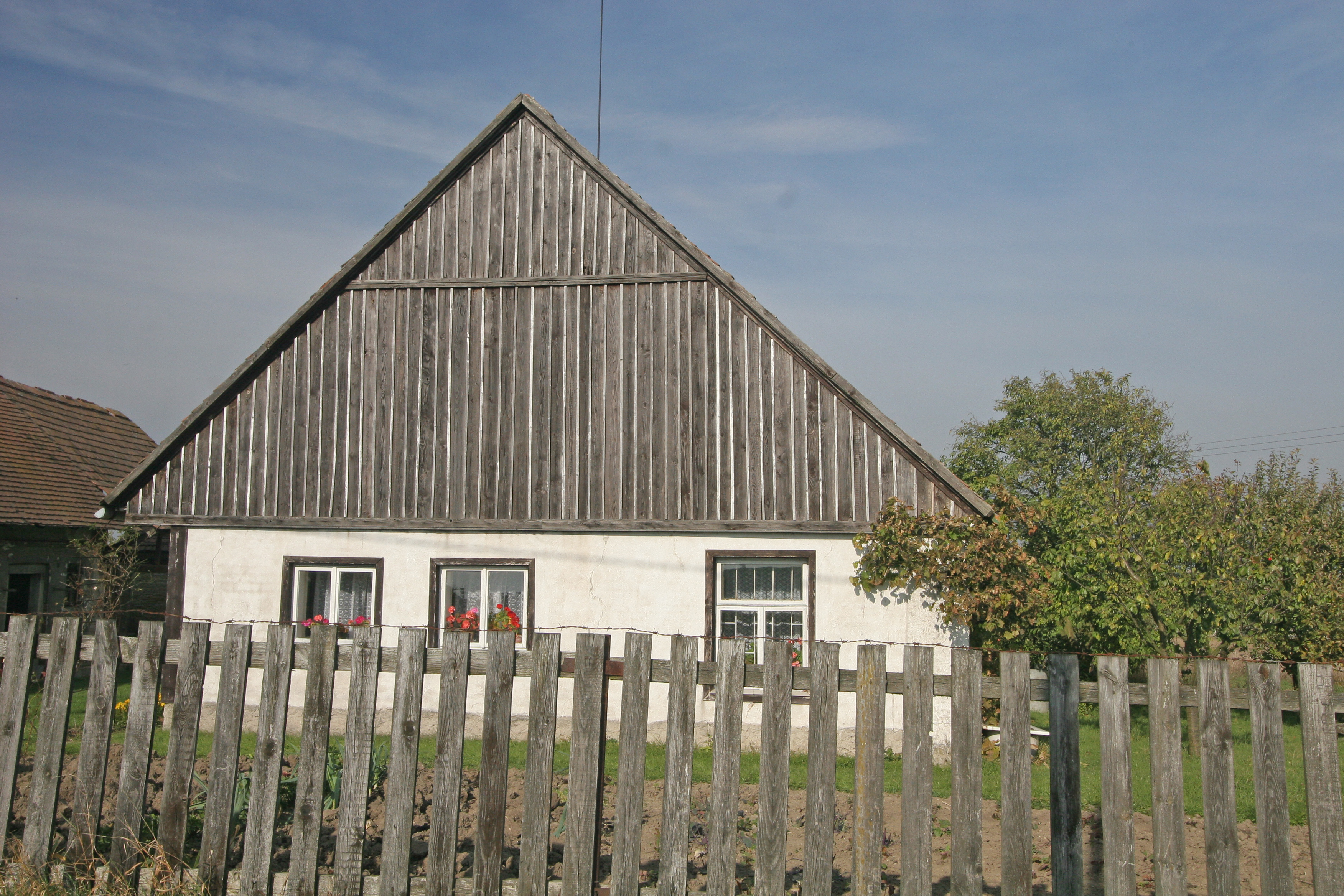 Horní Černilov čp. 7